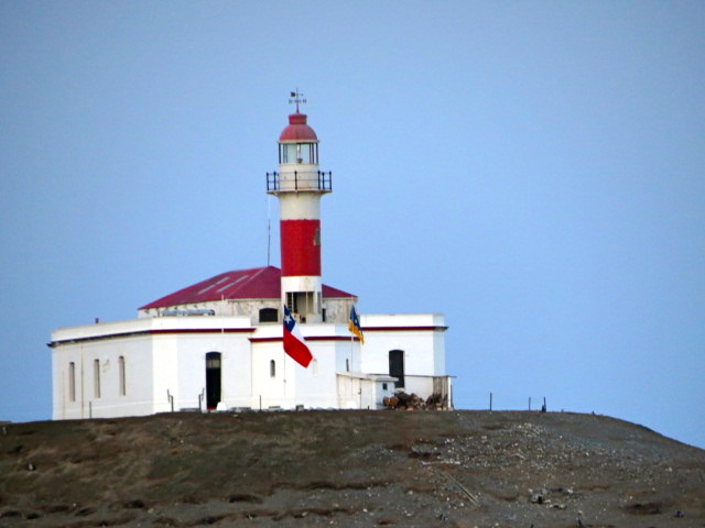 Faro en Isla Magdalena, Estrecho de Magallanes This is a photo of a national monument in Chile: 197